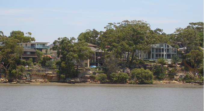 Oyster Bay